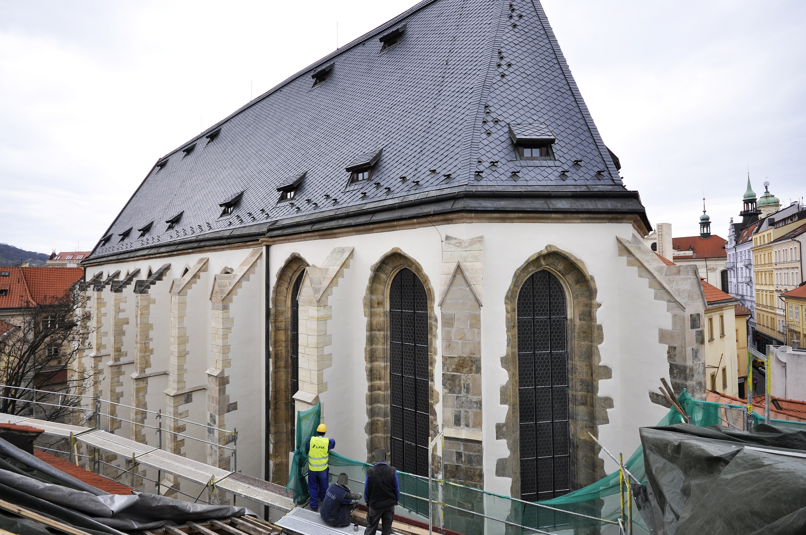 Anenský klášter, Anenské náměstí, Staré Město (Praha). Mm160322-psm-anna-160322-DSC2594